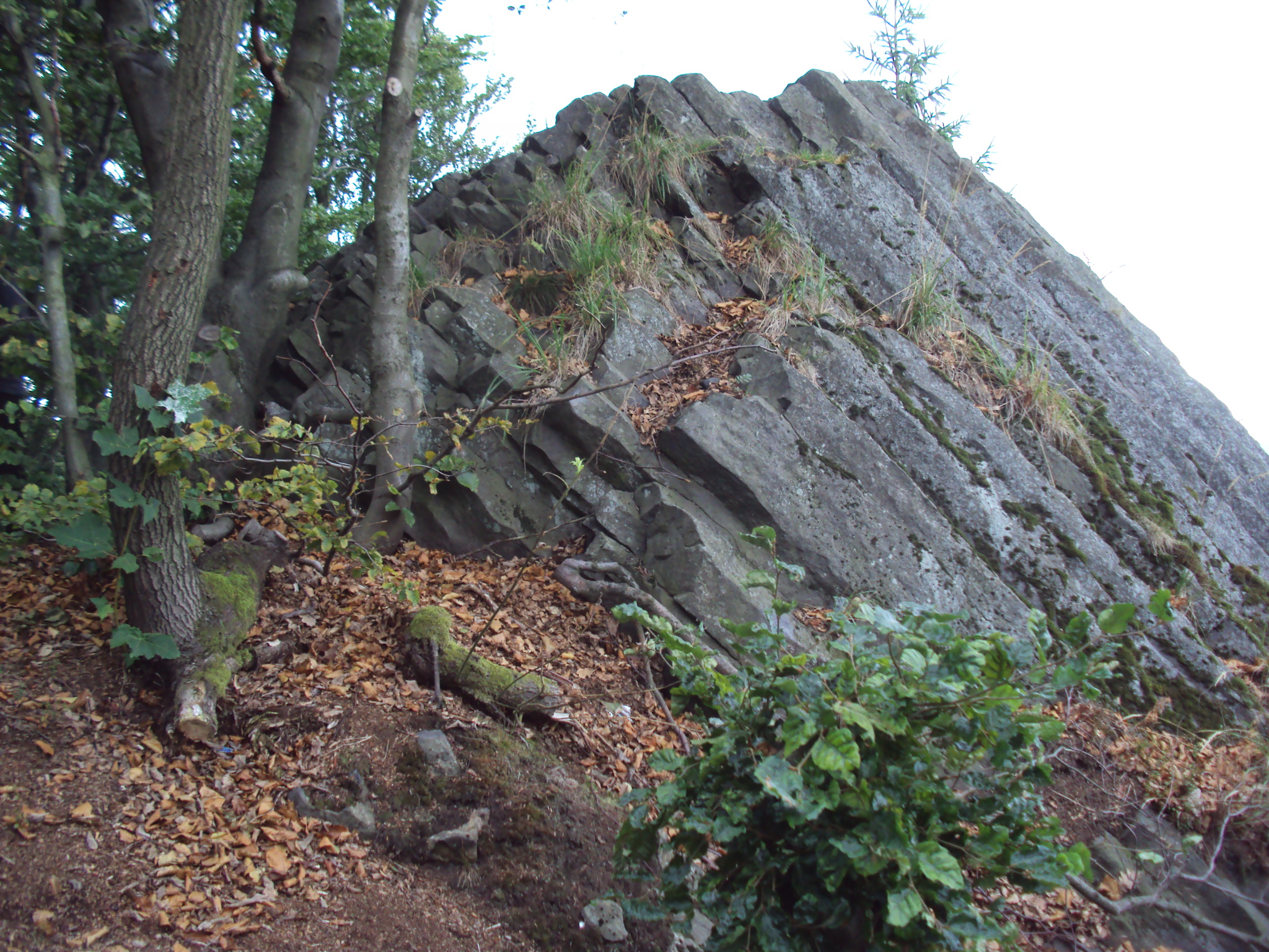 Vrcholová část České skály nad Práchní